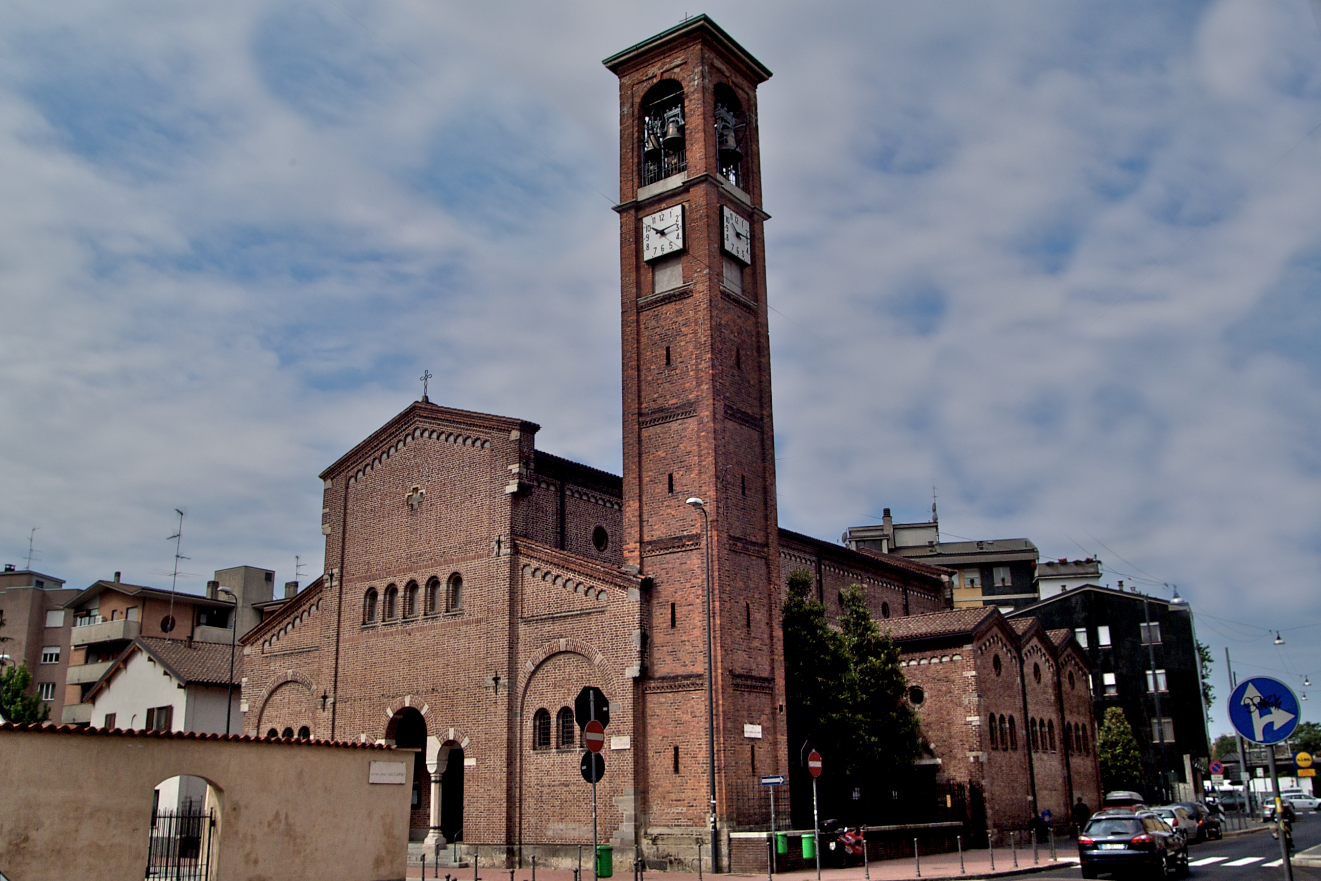 Chiesa di San Martino in Lambrate